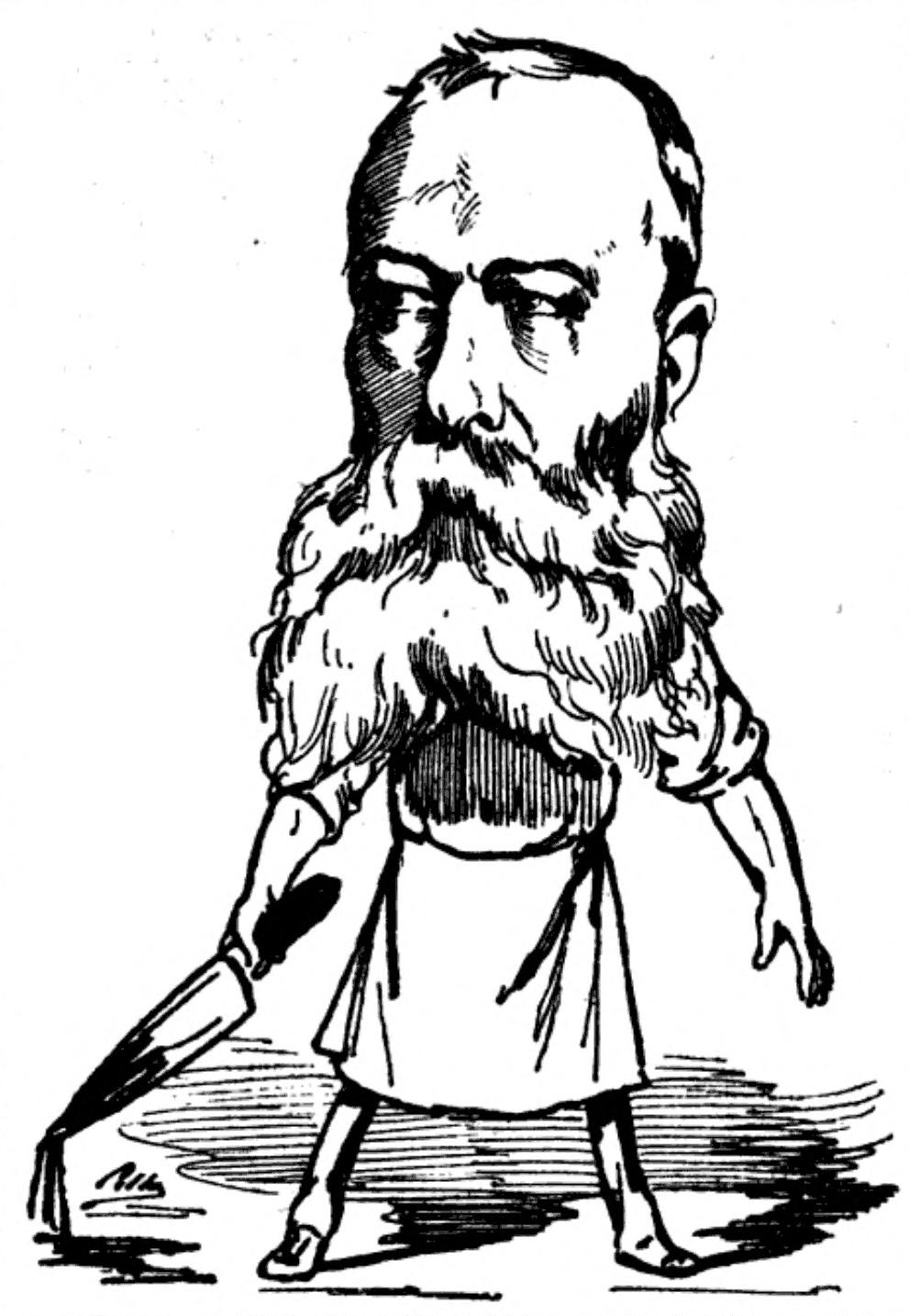 Federico Rubio y Galí.